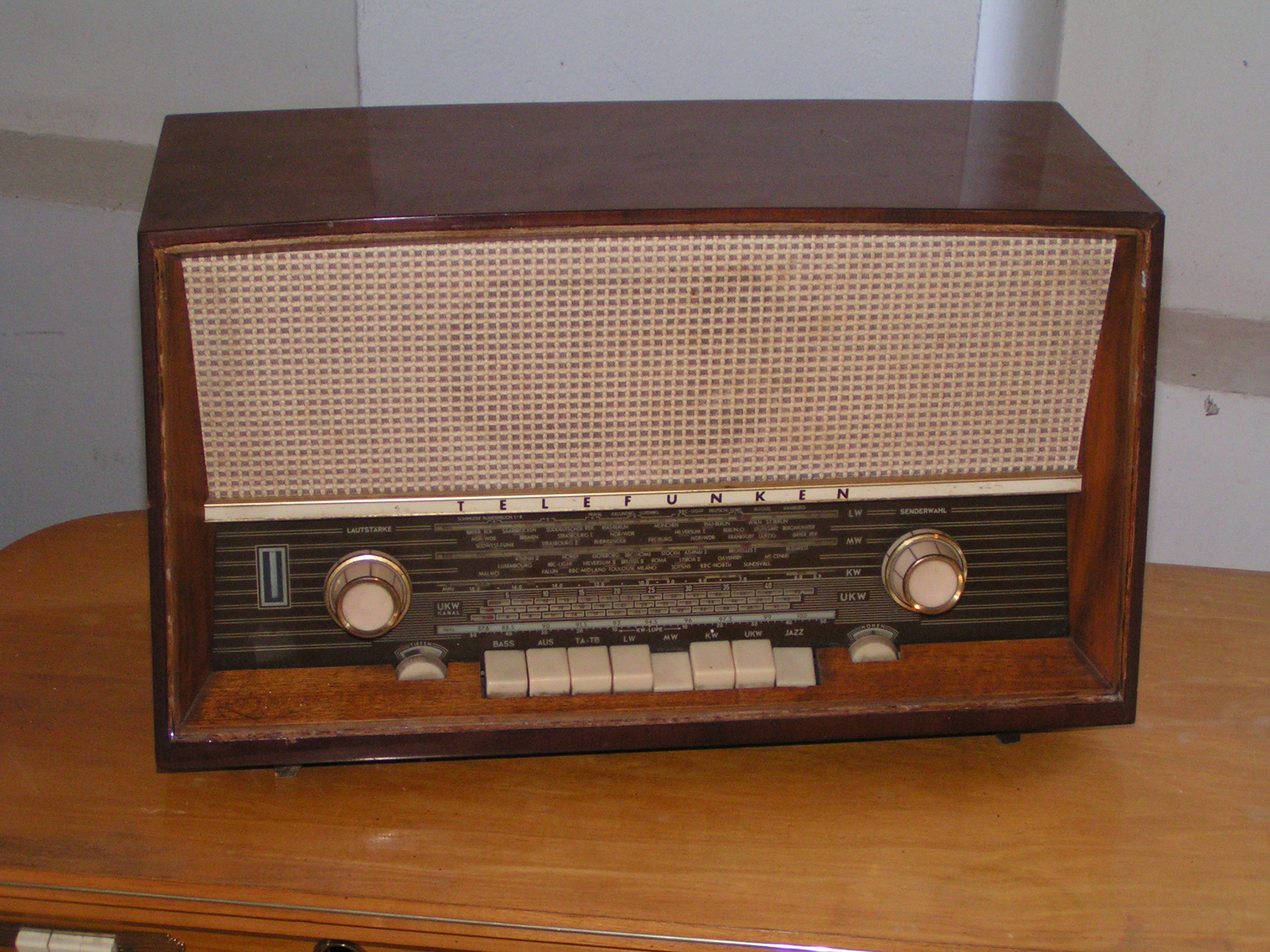 Telefunken-Radio auf dem Roscheider Hof bei Konz (1. August 2004)